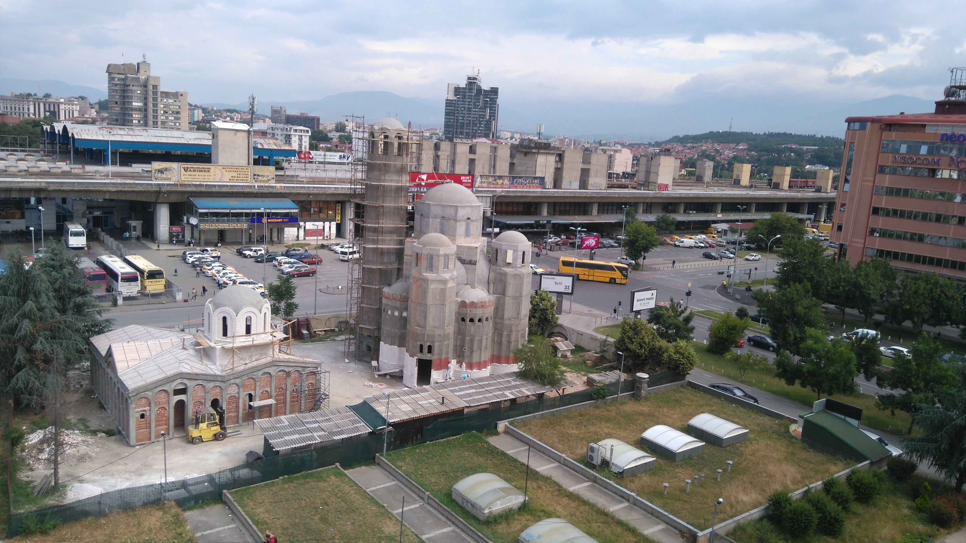 Црква „Св. Три Светители“, Мичурин, Скопје.